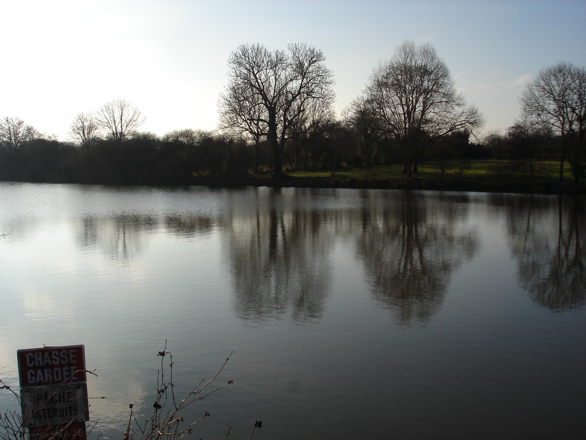 Champillet (36) : L'étang.